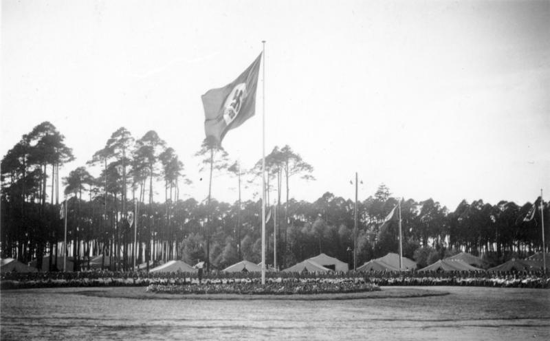 Zeltlager des weiblichen Arbeitsdienstes in Nürnberg Reichsparteitag 1939 - der nicht mehr stattfand